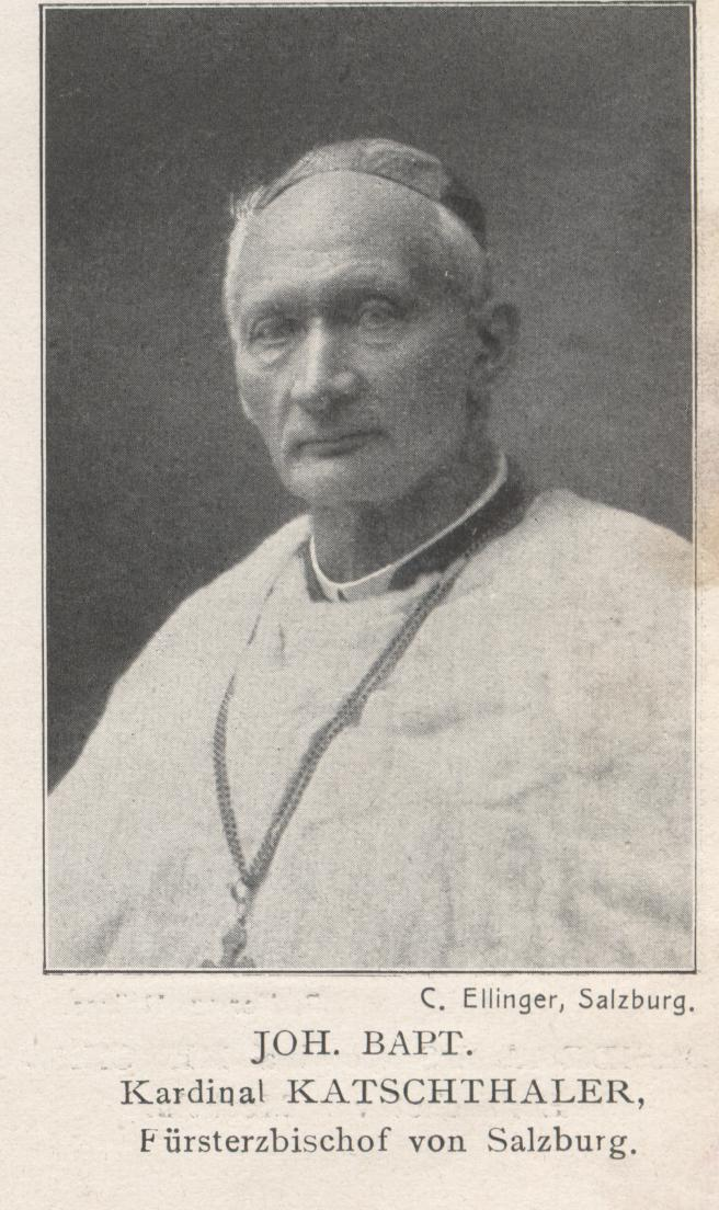 Photo